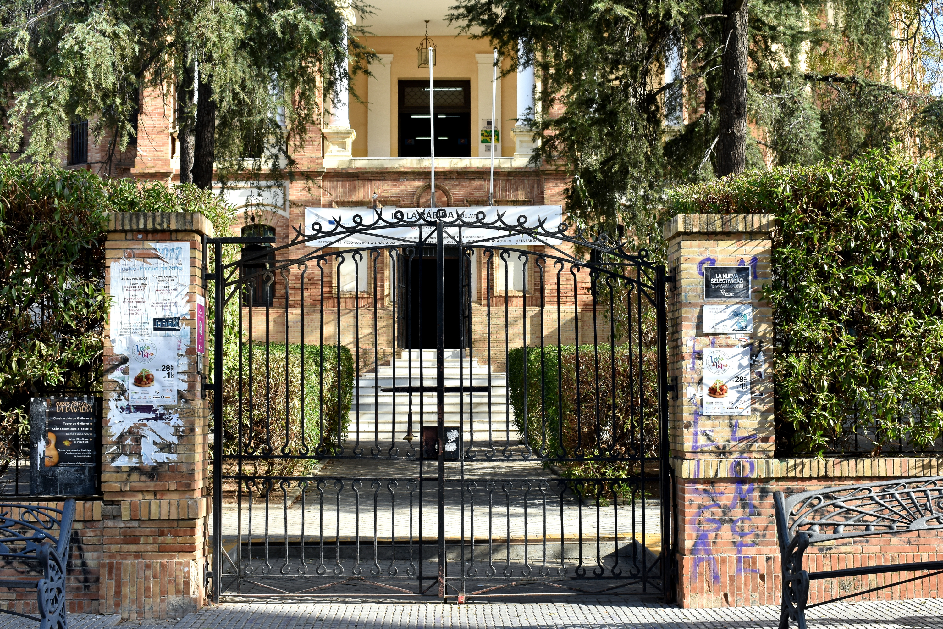 Es la vía de acceso al centro. Se ven las puerta abiertas del sótano y de la planta principal.